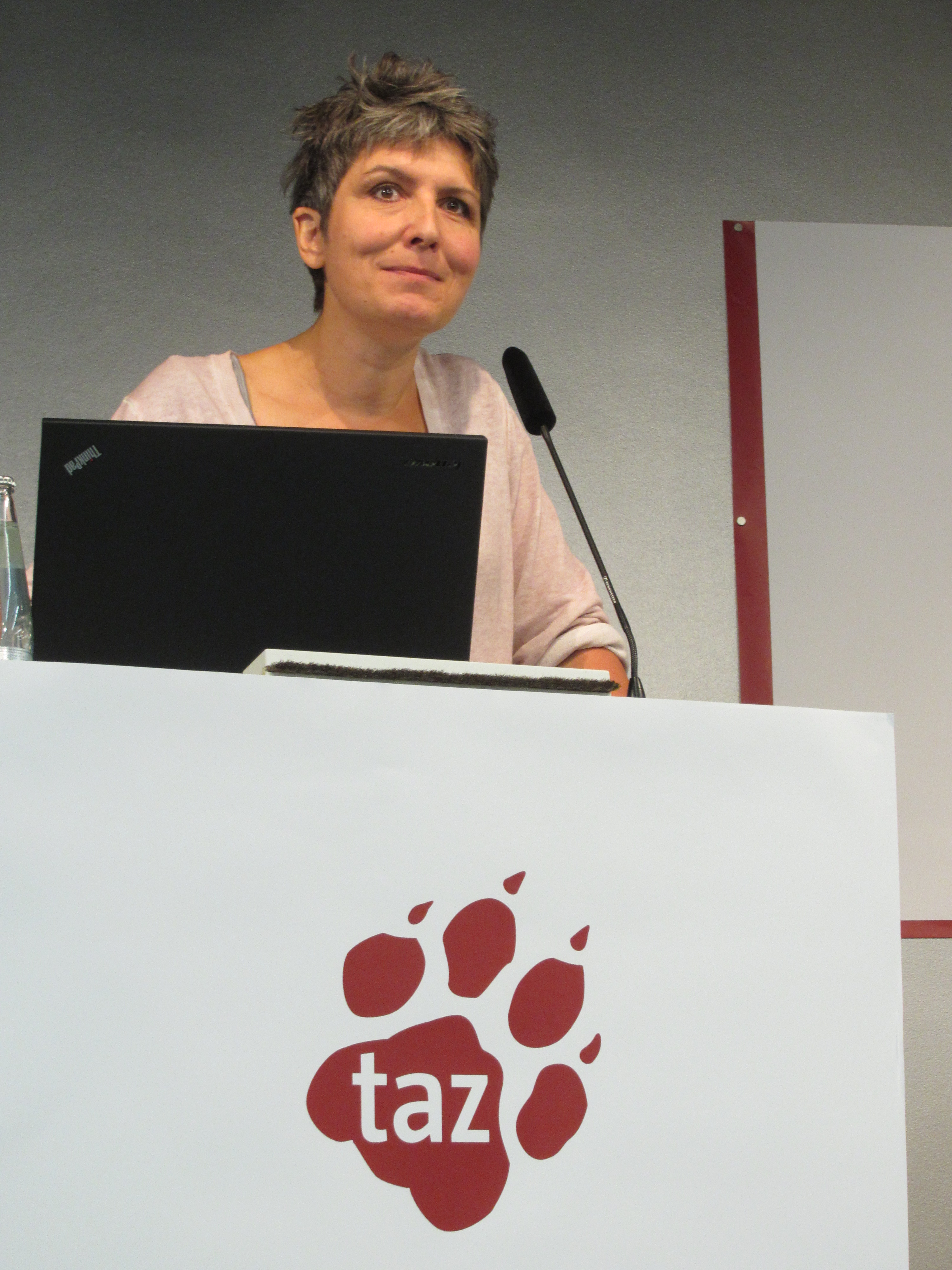 Ines Pohl (* 12. April 1967 in Mutlangen) deutsche Journalistin und seit 2009 Chefredakteurin der taz während der ordentlichen taz-Generalversammlung am 13. September 2014 in Berlin